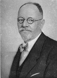 Josef Gruber (1867-1945), poslanev Říšské rady